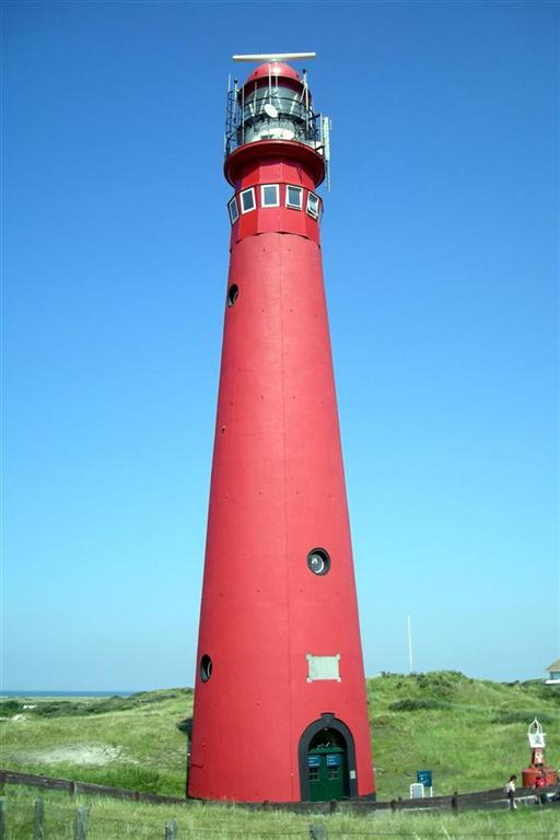 Vuurtoren in Schiermonnikoog (noordertoren)